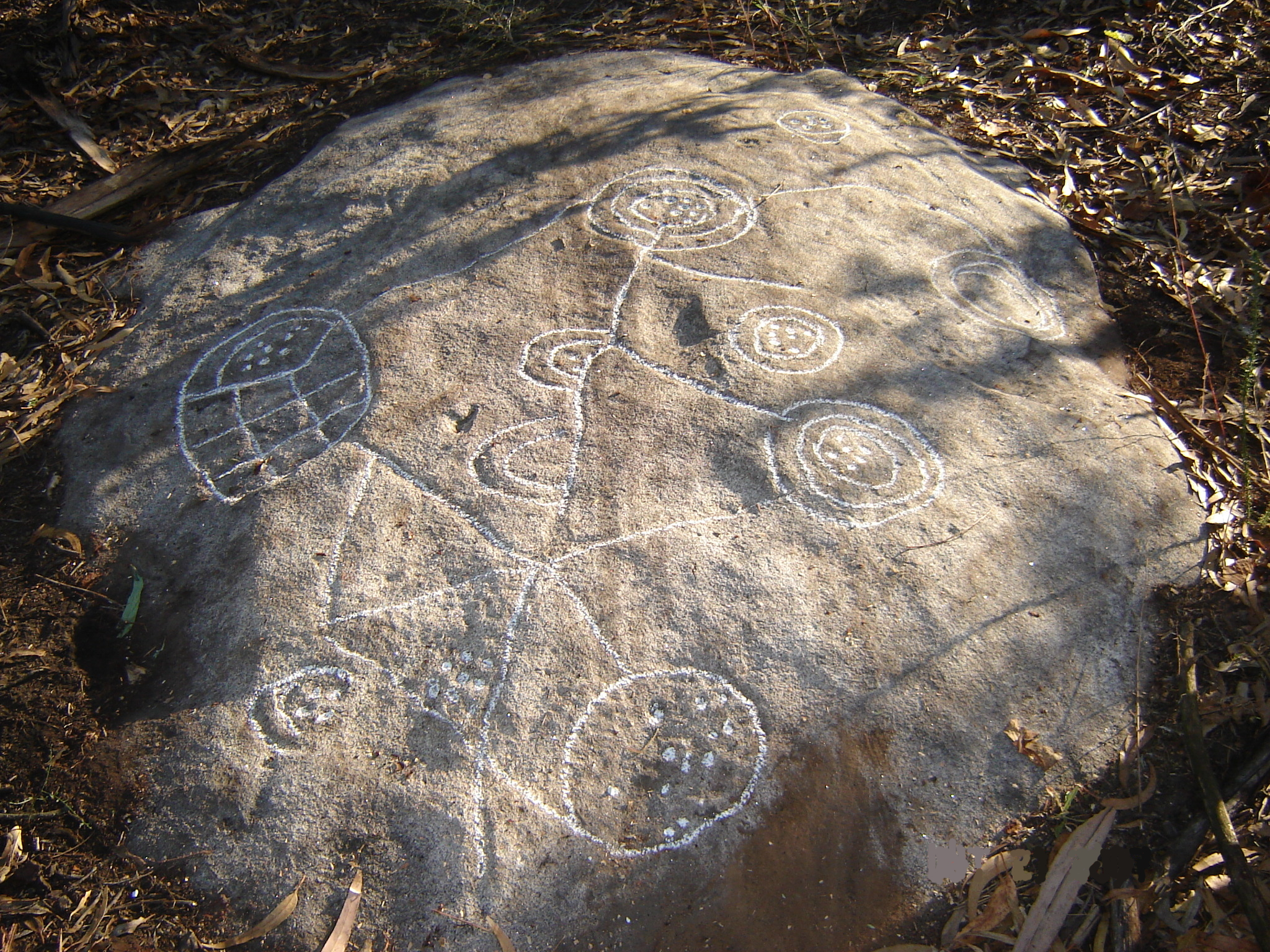 Vestígios arqueológicos em Verdoejo